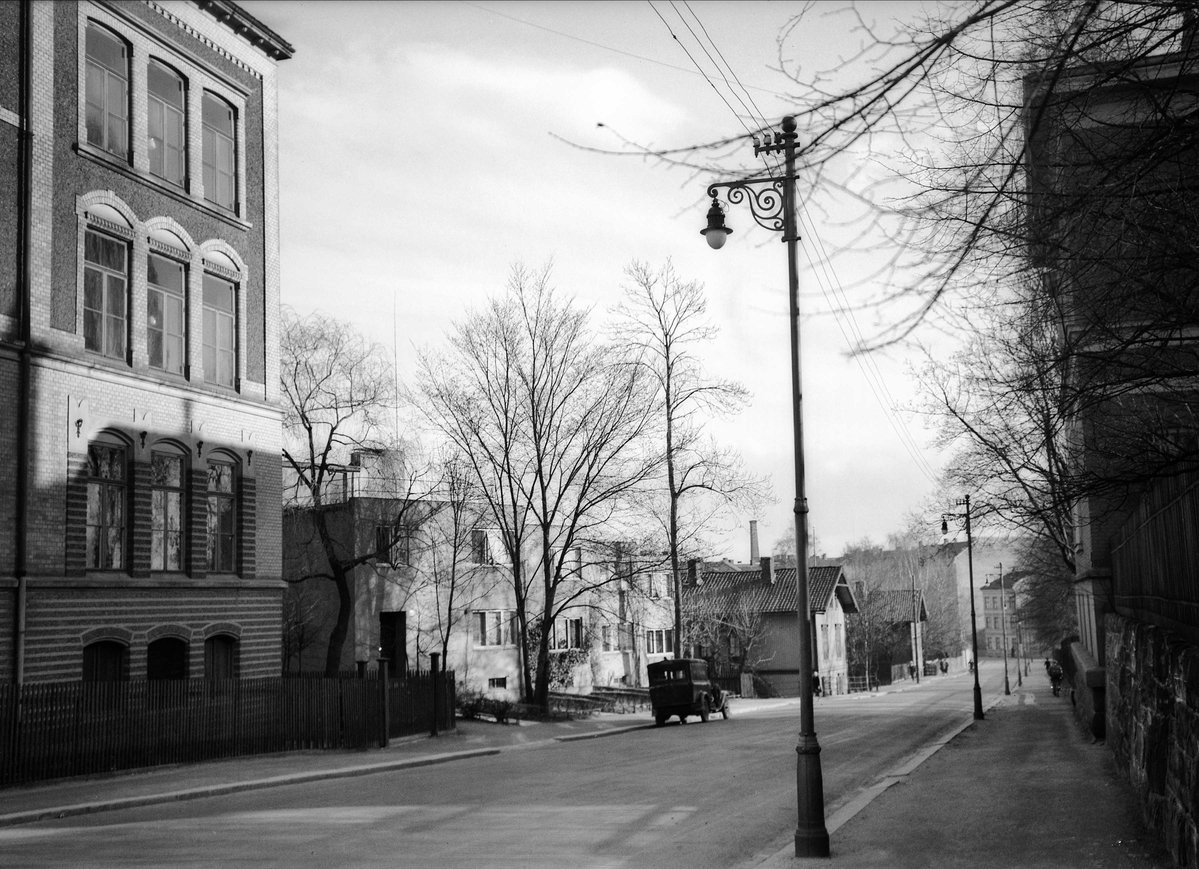 Nedre del av Industrigata i 1938. Nedenfor Nicolai Beers rekkehus i nr. 15 ses gamle trehus i nr. 13 og 3 som siden er revet. I deres sted står nå Briskeby brannstasjon og et lite funkisrekkehus.